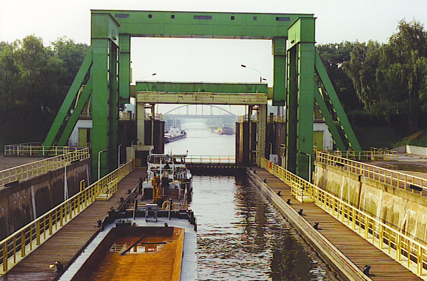 Scheepslift op het Mittellandkanal bij Magdeburg - eigen foto - zomer 1992